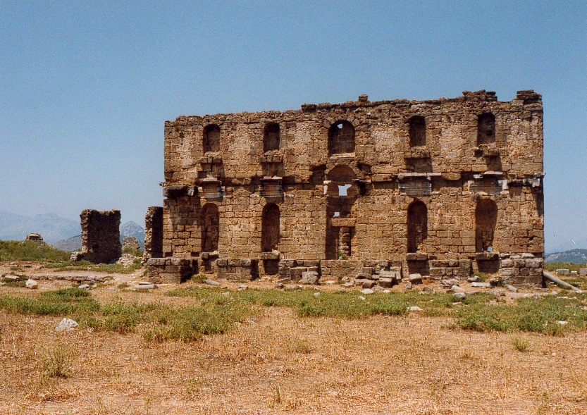 Aspendos - Nymphaion